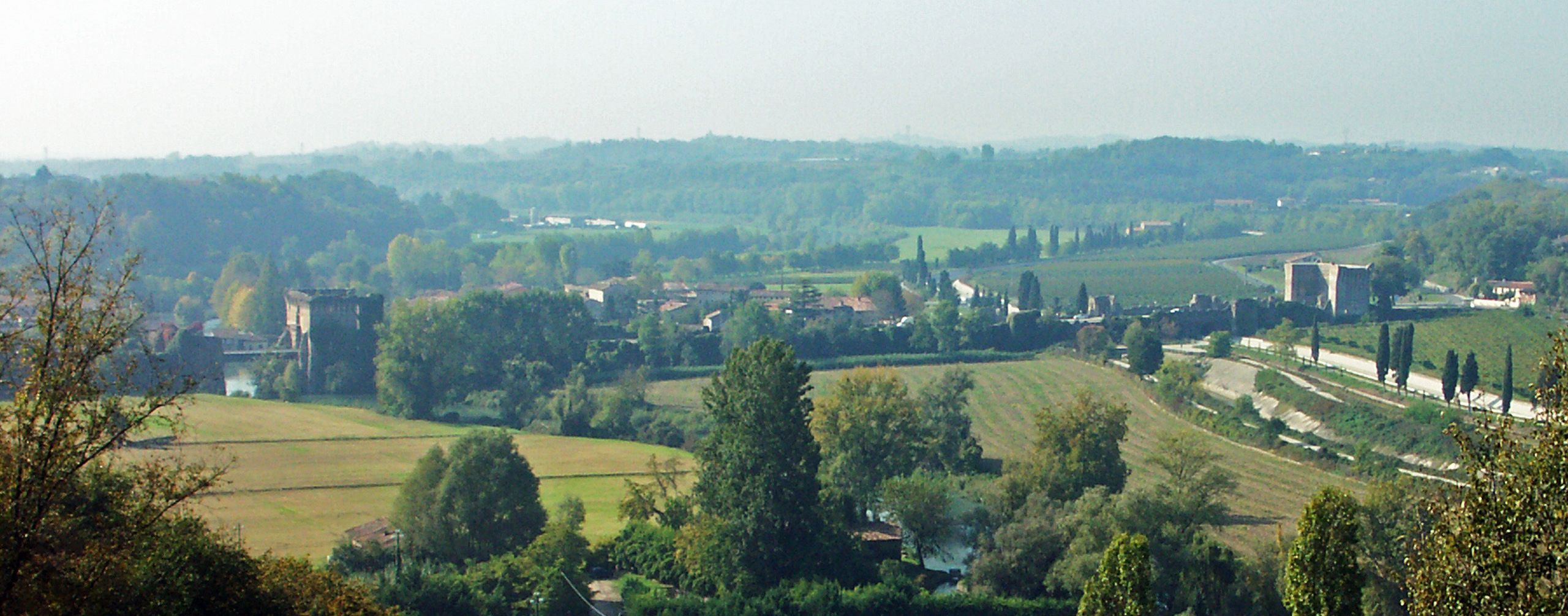 Visconti-Brücke, Gesamtansicht